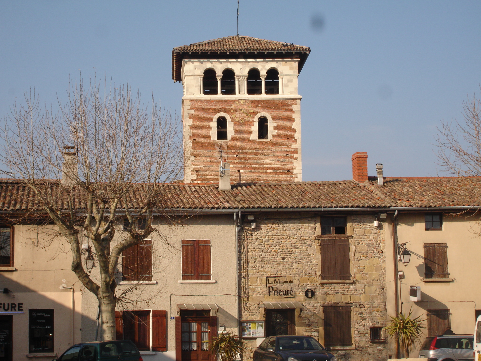 Ternay (69) : Grand'place et clocher de l'église